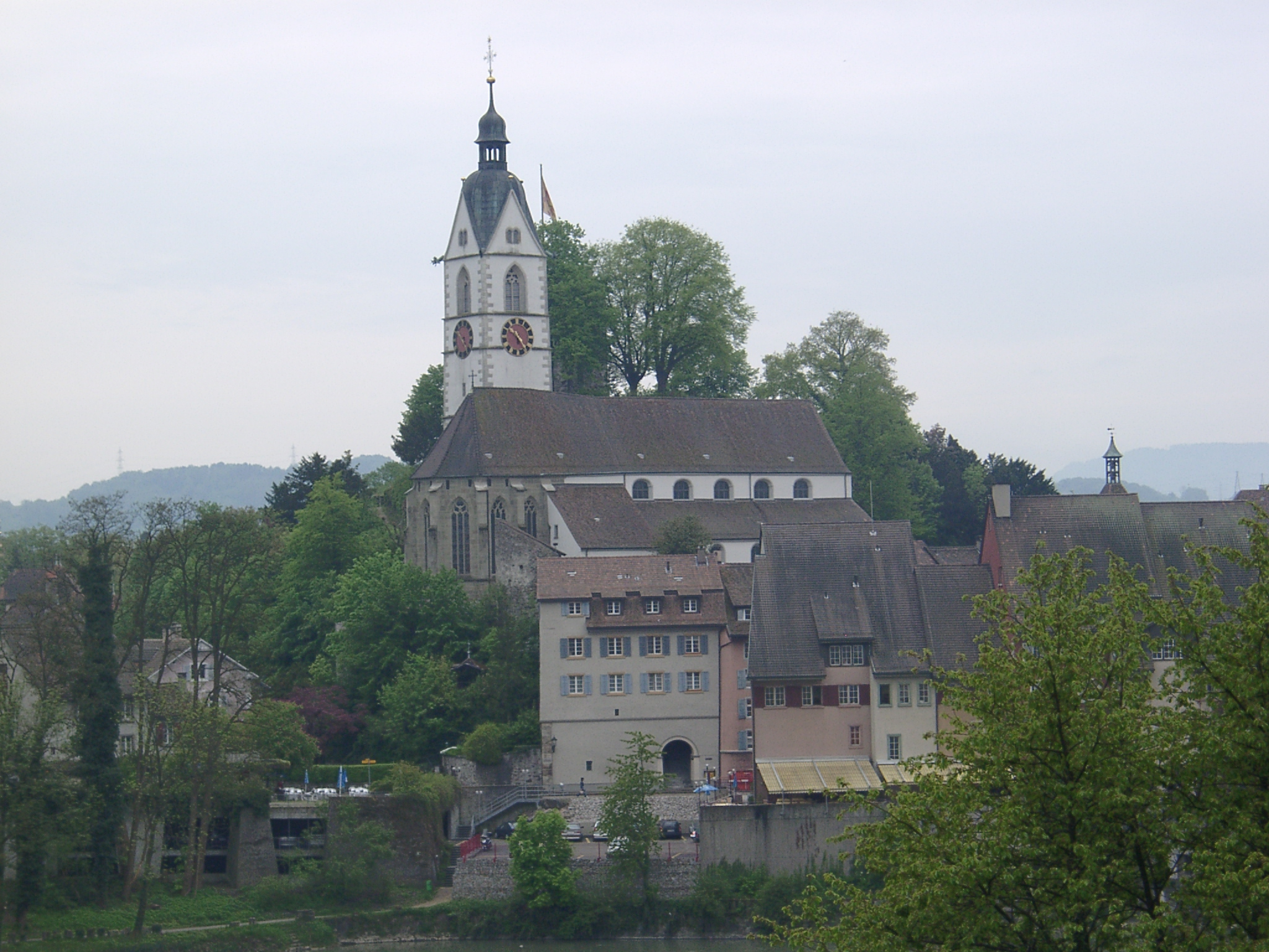 Laufenburg Aargau